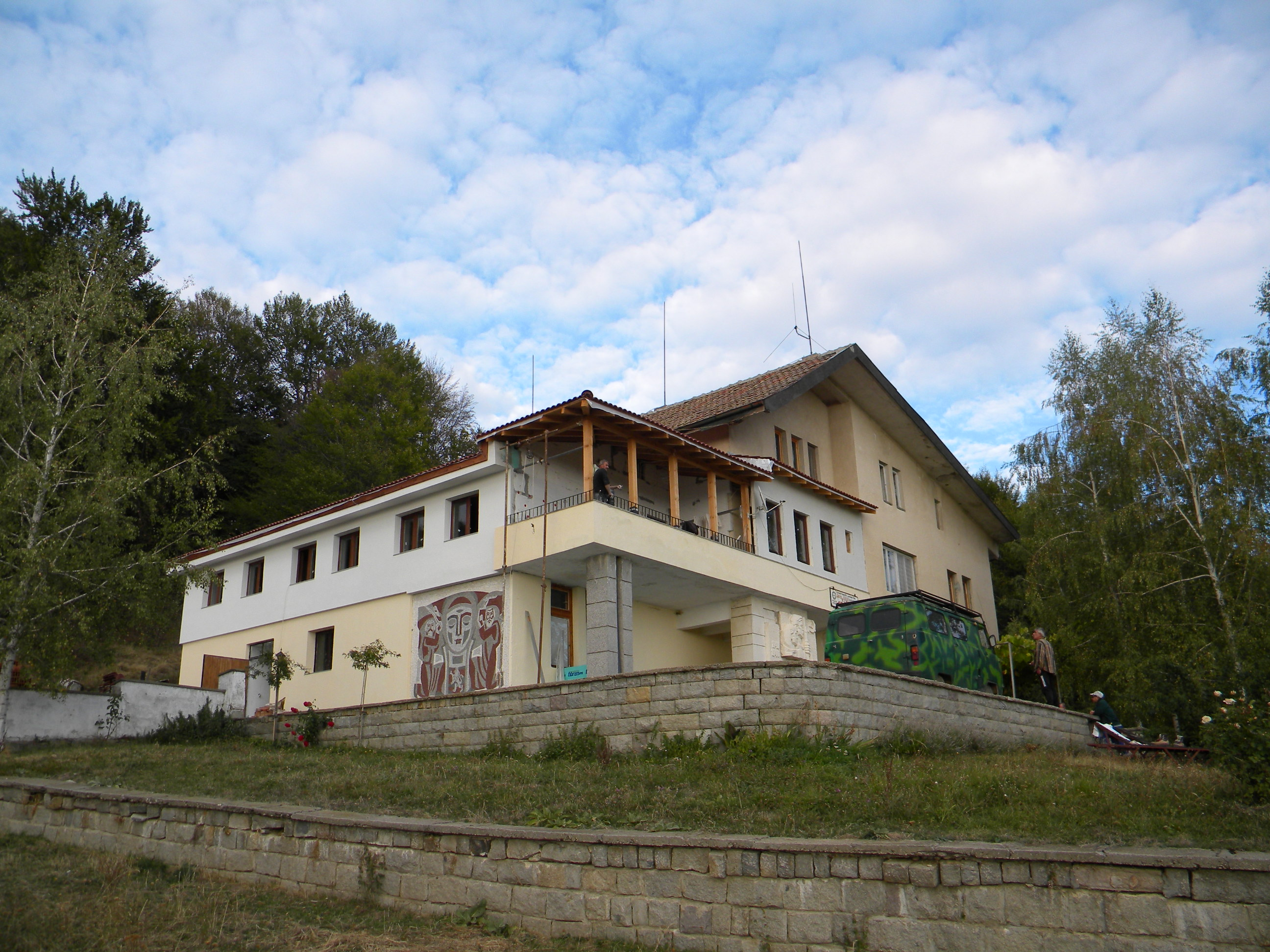 Общ изглед Хижа Свежен